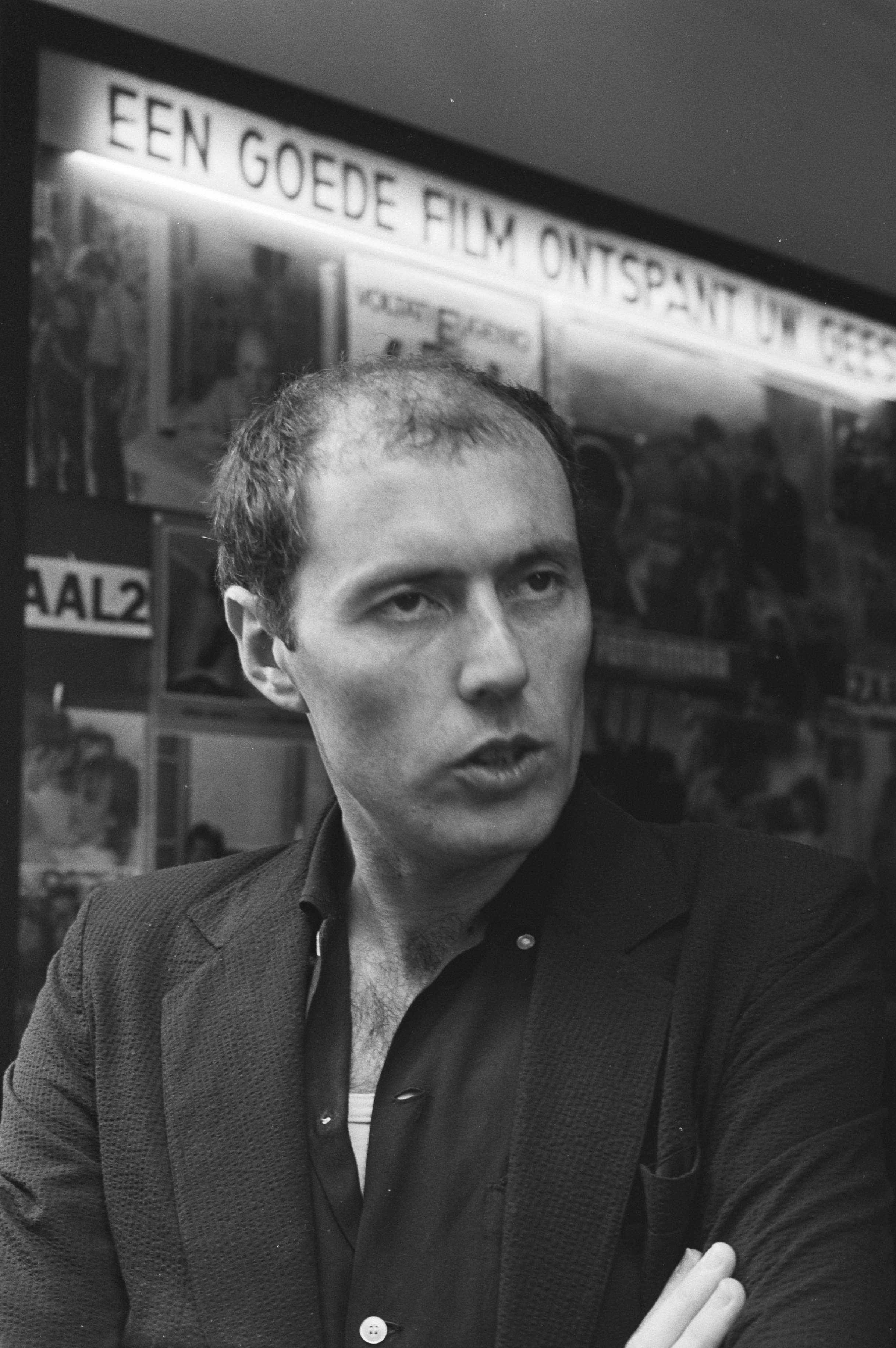 Collectie / Archief : Fotocollectie Anefo Reportage / Serie : Persvoorstelling van de film "Het meisje met het rode haar" Beschrijving : Ben Verbong Datum : 15 september 1981 Trefwoorden : films, portretten, regisseurs Persoonsnaam : Verbong, Ben Fotograaf : [onbekend] Auteursrechthebbende : Nationaal Archief Materiaalsoort : Negatief (zwart/wit) Nummer archiefinventaris : bekijk toegang 2.24.01.05 Bestanddeelnummer : 931-6825